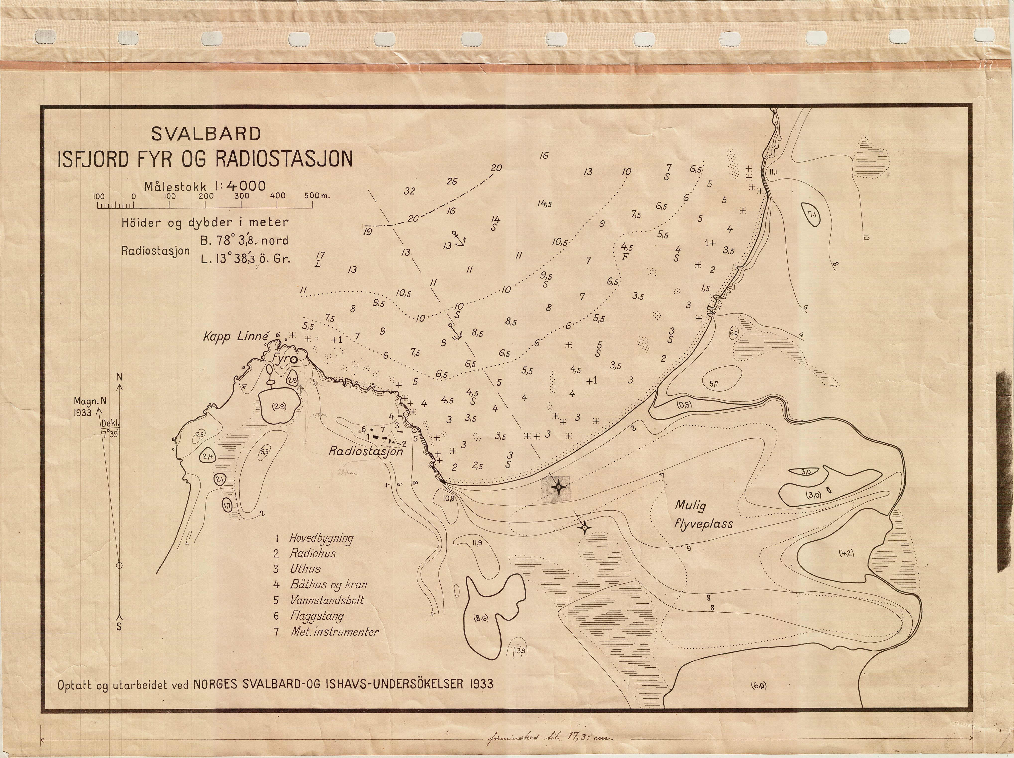 Kart over Svalbard ved Isfjord fyr og radiostasjon fra 1933. Oppmålt under Norges Svalbard- og Ishavsundersøkelser i 1933. Trykket og utgitt i målestokk 1:4 000. Original dokumentstørrelse ca 65 cm x 42 cm. Et eksemplar befinner seg hos Statens kartverk Sjø i Stavanger.